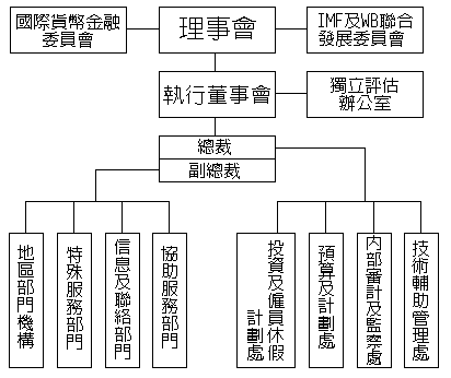 修改自User:Sznscand的圖片